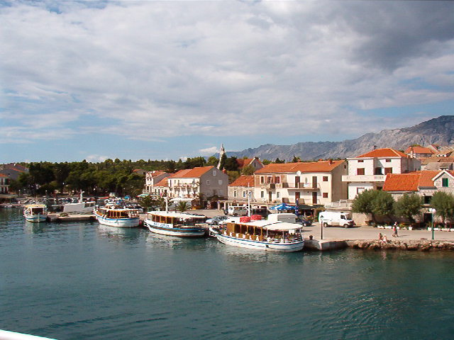 Sućuraj, en Hvar